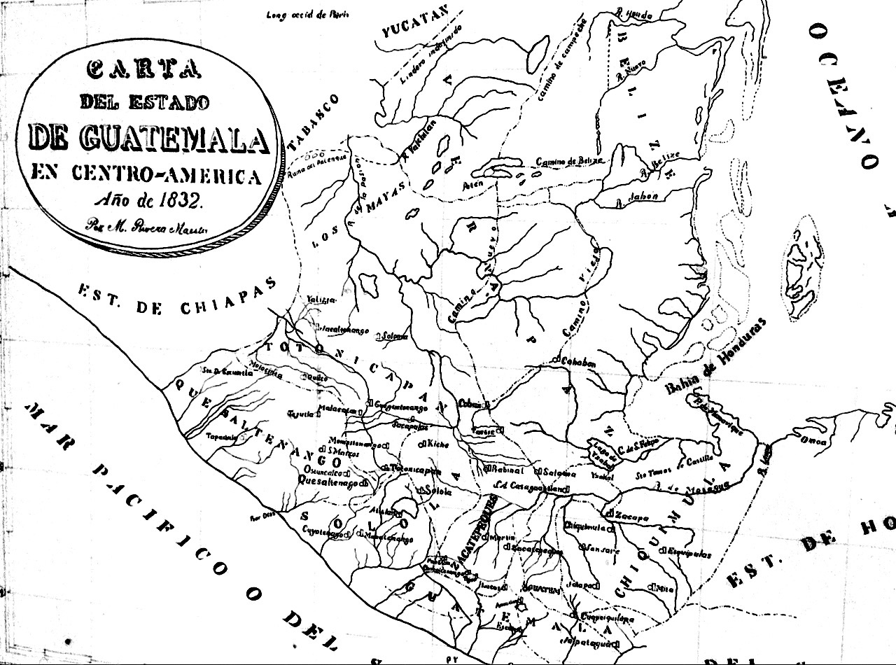 estadoguatemala1832